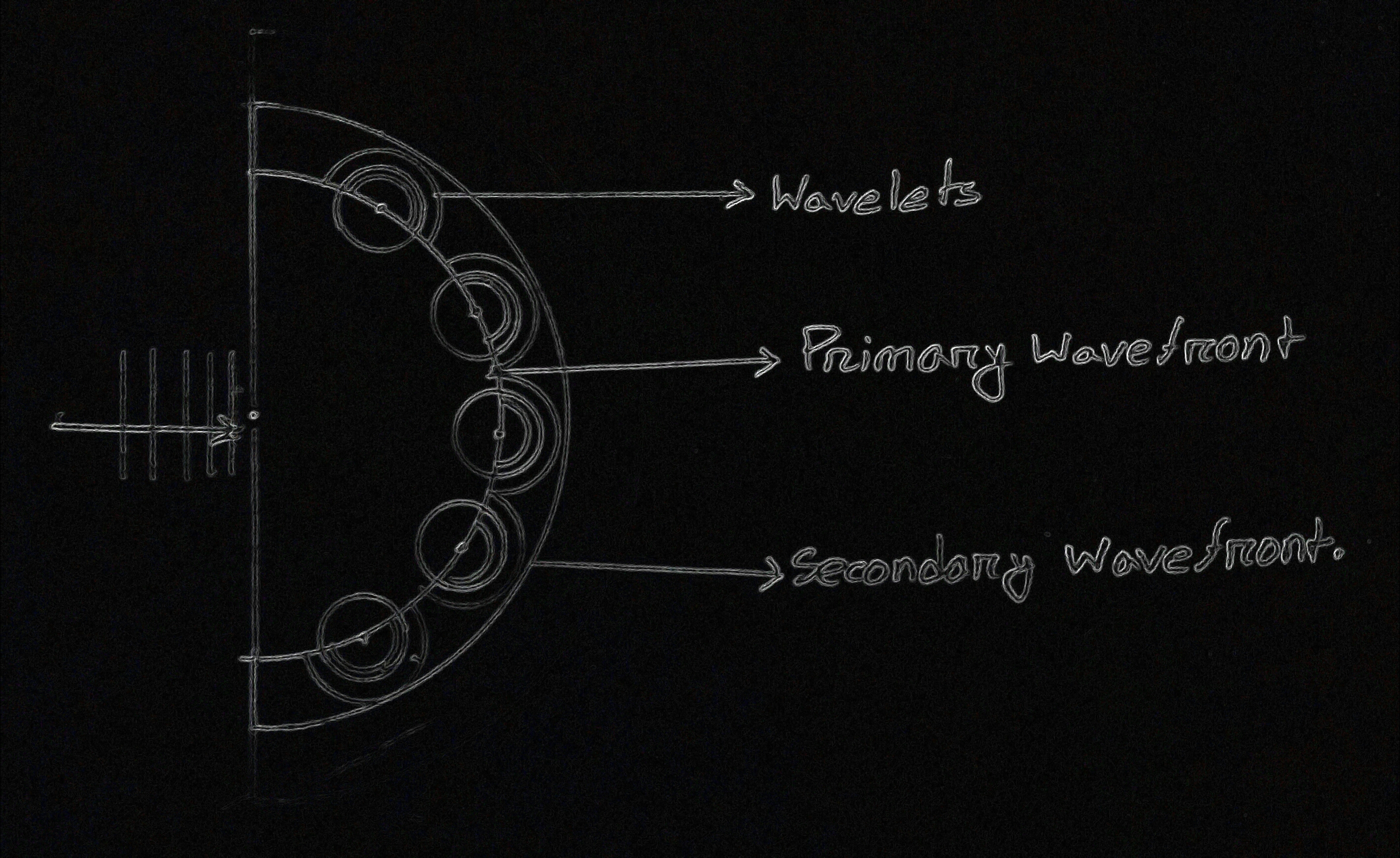 প্রাইমারী ওয়েবফ্রন্ট থেকে সৃষ্ট গোলাকার ছোট তরঙ্গের সমষ্টি সেকেন্ডারী ওয়েবফ্রন্ট তৈরি করে।